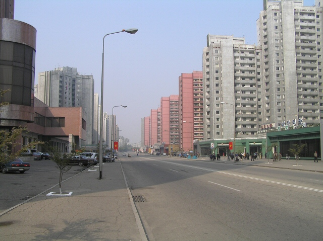 Eigen foto, GNU/FDL